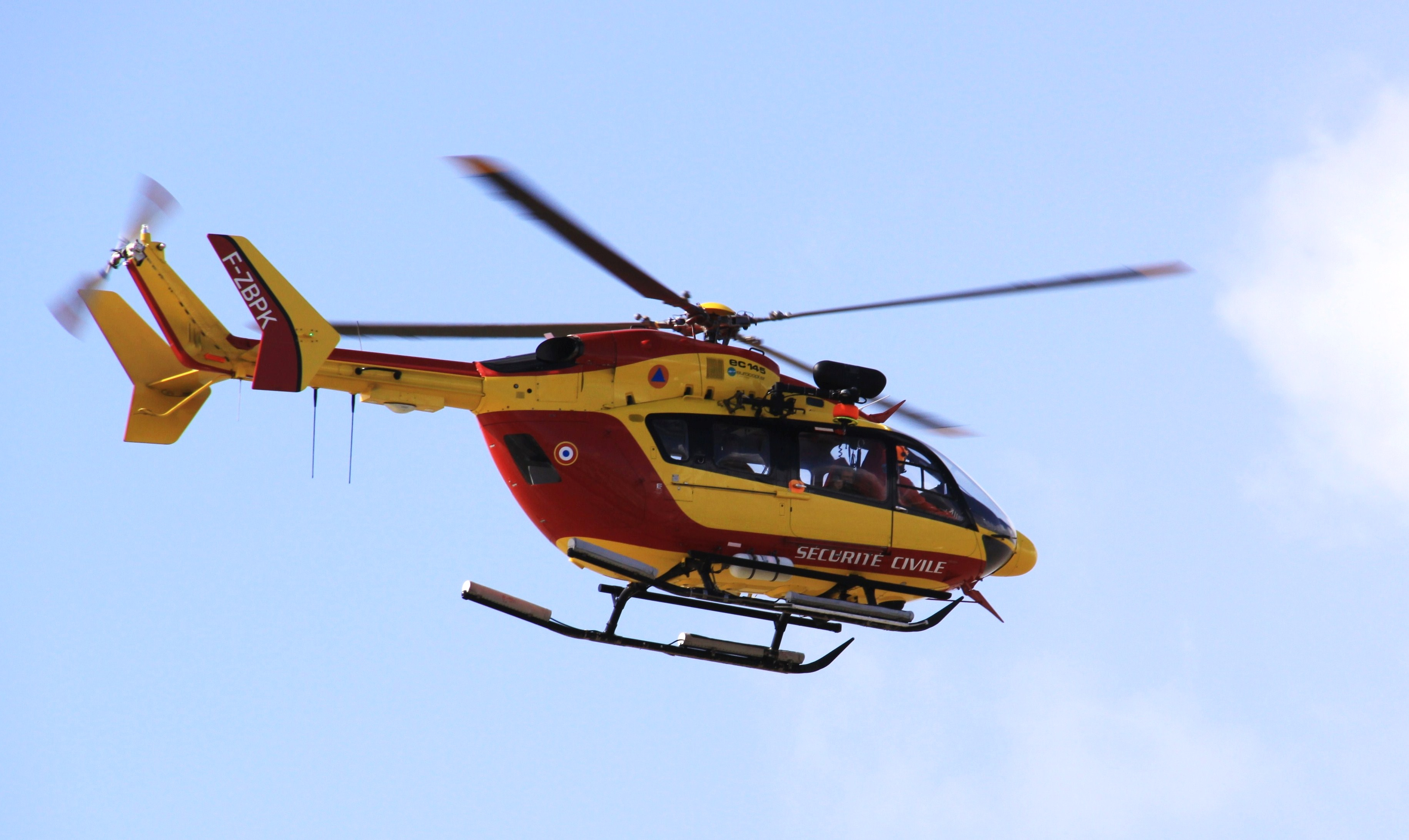 Un hélicoptère Eurocopter EC-145, utilisé par la Sécurité Civile française, survolant le port de plaisance de Minimes à La Rochelle au début de l' après-midi du dimanche 28 février 2010 après le passage dans la nuit de la tempête baptisée "Xynthia". Immatriculation de cet appareil: F-ZBPK. La Rochelle (Port de Plaisance des Minimes), Charente Maritime, France.